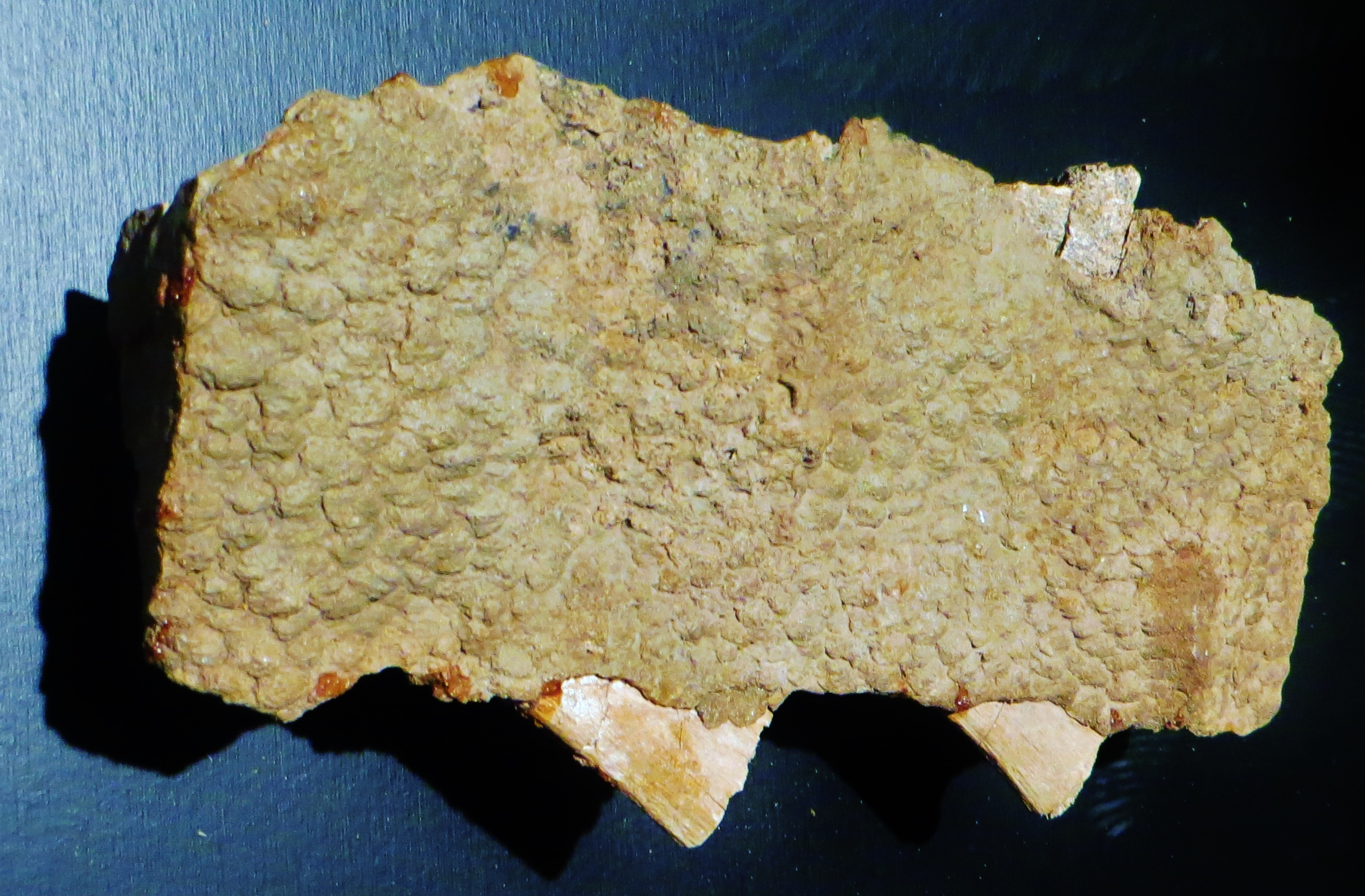 Fossil of Saurolophus, an extinct reptile- Took the picture at Dinosaurium, Prague